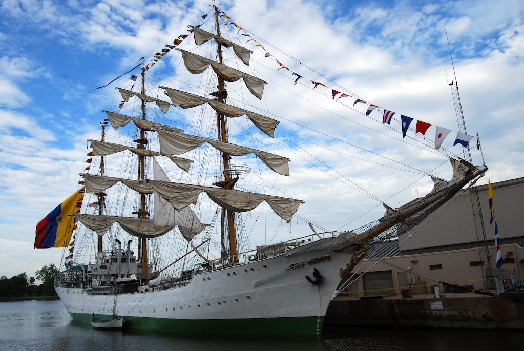 Colombian National Armada ARC Gloria.